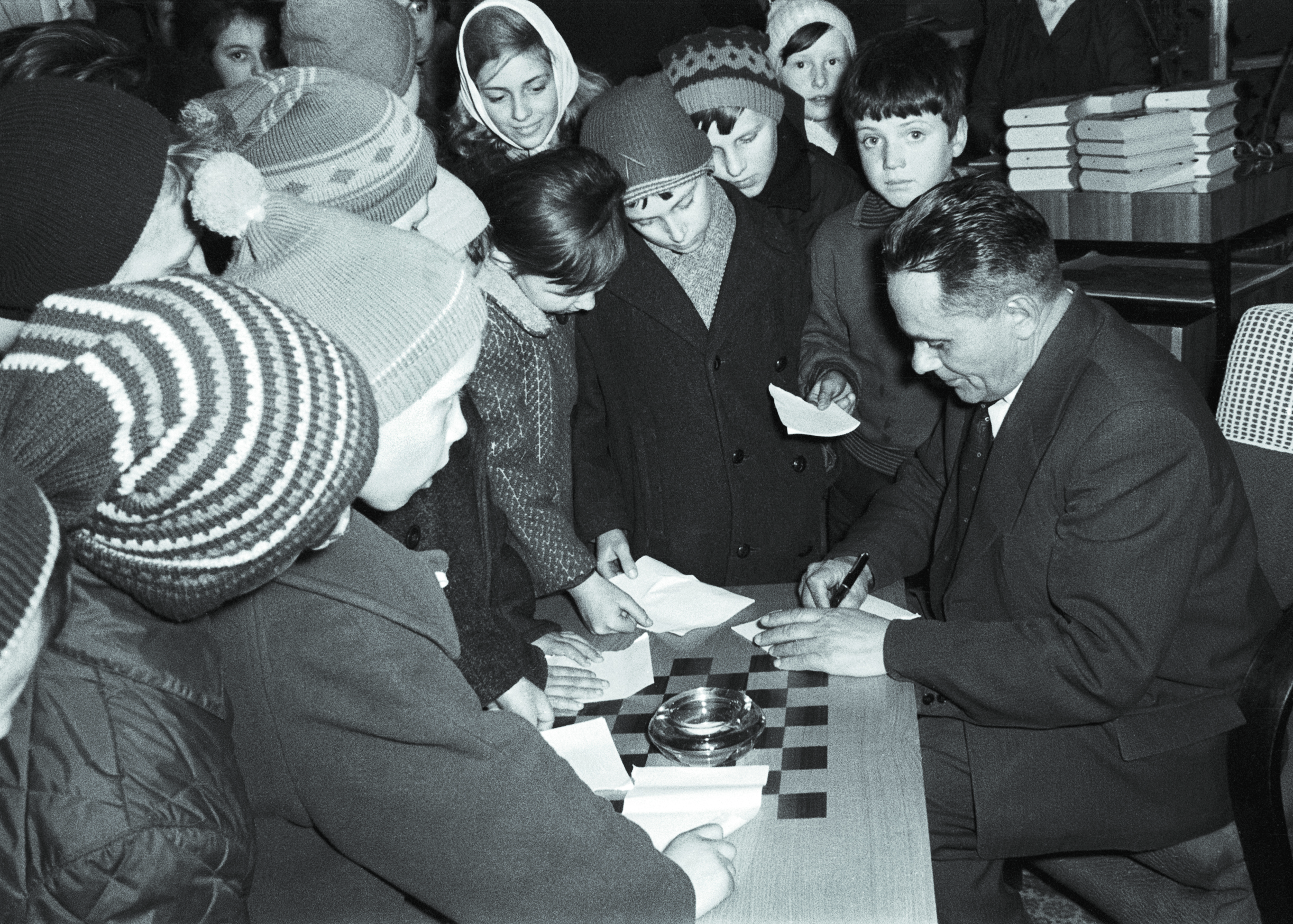 Miško Kranjec je v mariborski knjigarni DZS podpisoval svoj nov roman